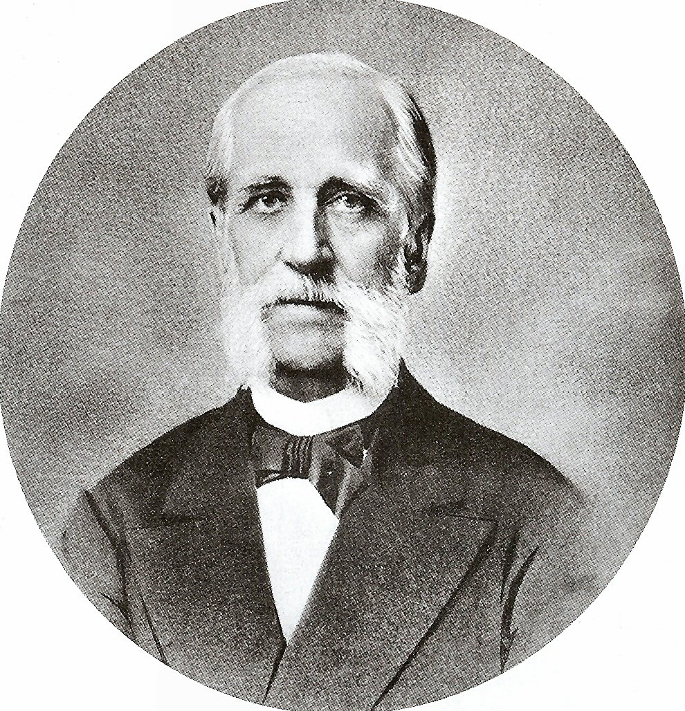 Александр Иванович Кракау (1817-1888)